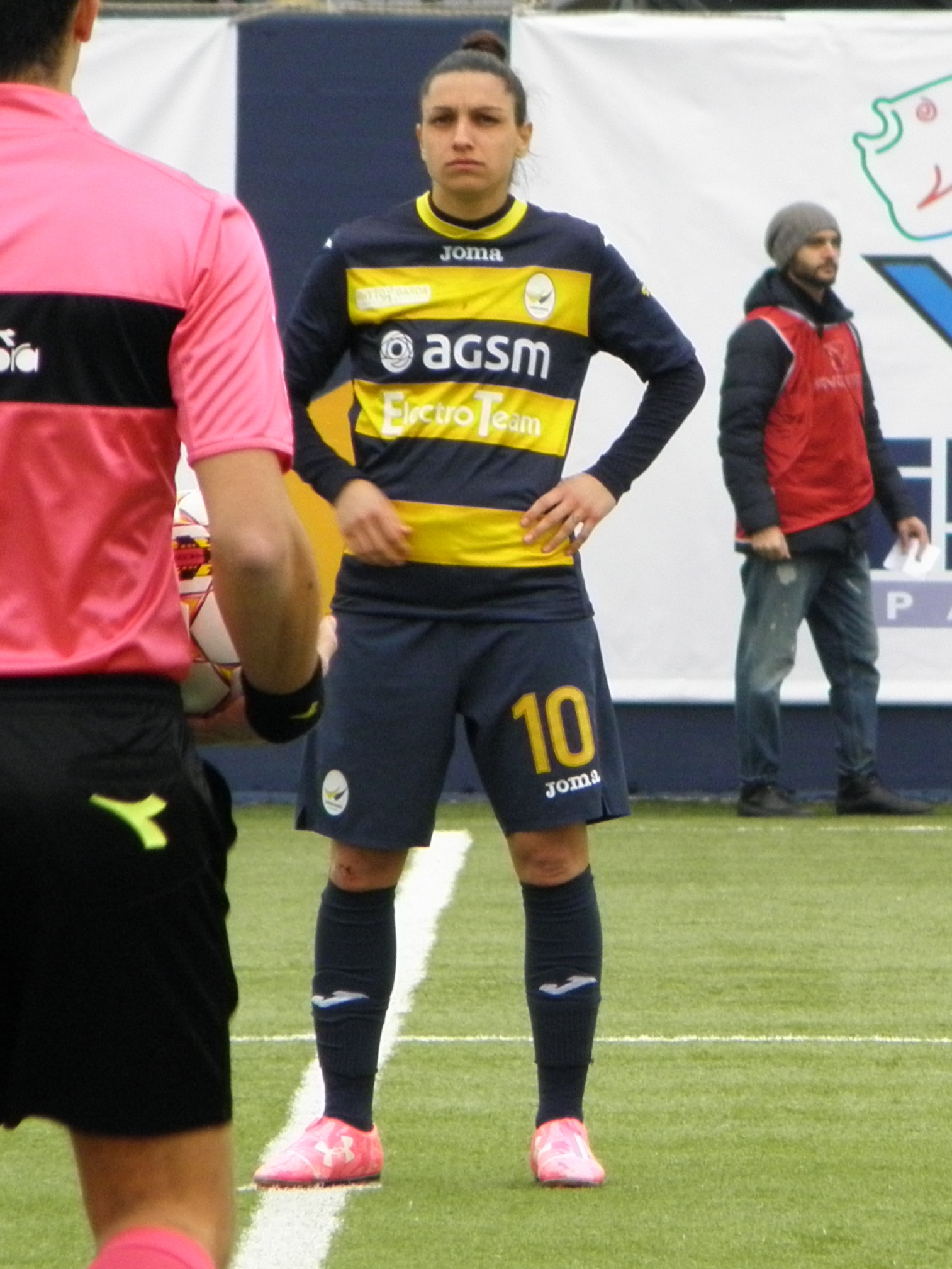 Verona, Stadio Aldo Olivieri: Sophia Koggouli in Fimauto Valpolicella - AGSM Verona del 17 febbraio 2018.